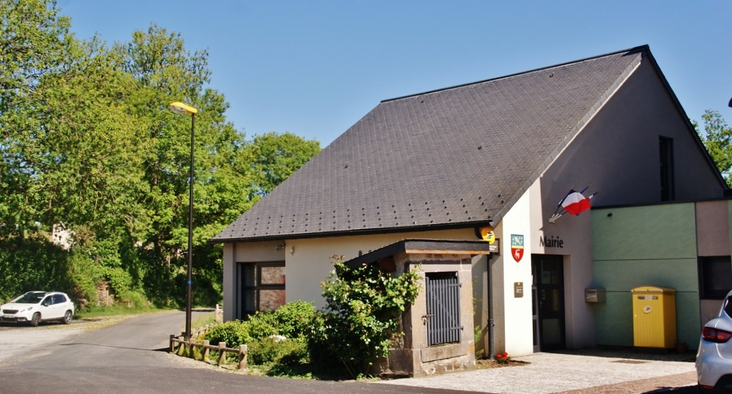 La Mairie